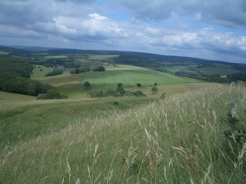 Blick auf die South Downs vom Trundle